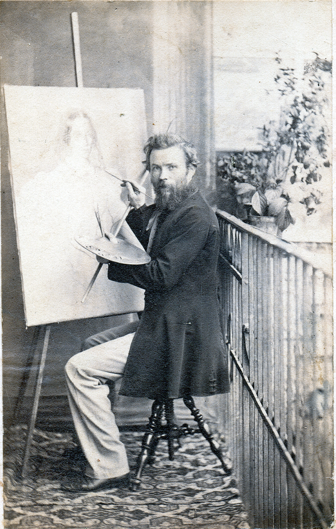 Portrétní fotografie slovenského malíře Petera Michala Bohúně (1822-1879)